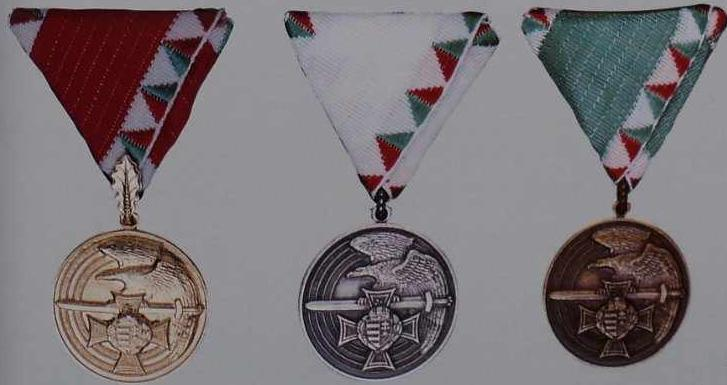 Szolgálati Érdemjelek 1992-es változat